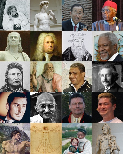 File:Hâfiz de Chiraz 241.jpg File:David von Michelangelo.jpg File:Cristina Fernández de Kirchner y Ban Ki-Moon.jpg File:Chinua Achebe - Buffalo 25Sep2008 crop.jpg File:2064 aryabhata-crp.jpg File:Haendel.jpg File:Confucius the scholar.jpg File:Kofi Annan.jpg File:ChiefJoseph.jpeg File:Plato-raphael.jpg File:Ronaldo2009Corinthians.jpg File:Einstein1921 by F Schmutzer 2.jpg File:Errol Flynn1.jpg File:MKGandhi.jpg File:Ole Henrik Magga 140x190.jpg File:Thomas Beatie.jpg File:Michelangelo Buonarroti 017-corrected.jpg File:Da Vinci Vitruve Luc Viatour.jpg File:Man and child (Fylkesarkivet i Sogn og Fjordane).jpg File:Herakles and Telephos Louvre MR219.jpg